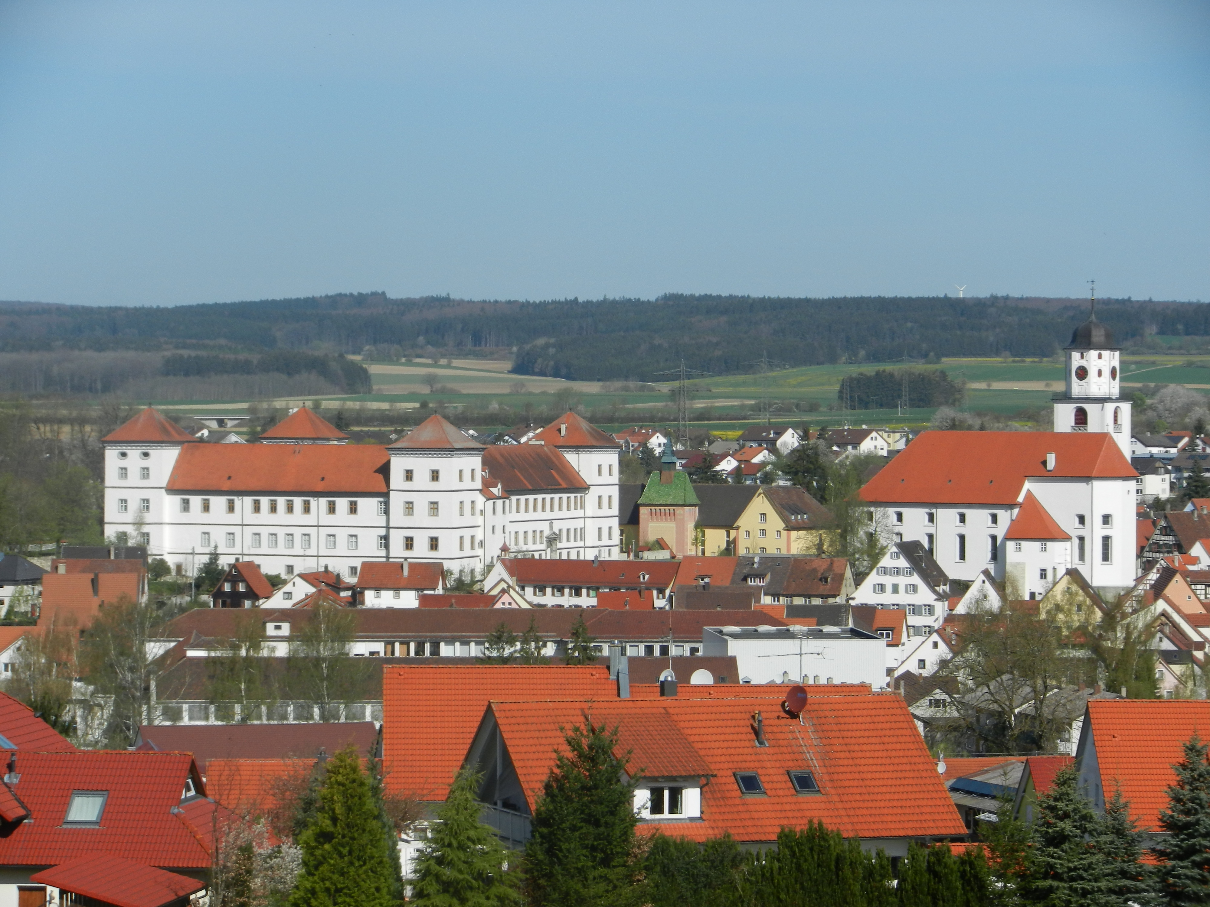 Schloss Meßkirch, St. Martin in Meßkirch, Herz-Jesu-Heim